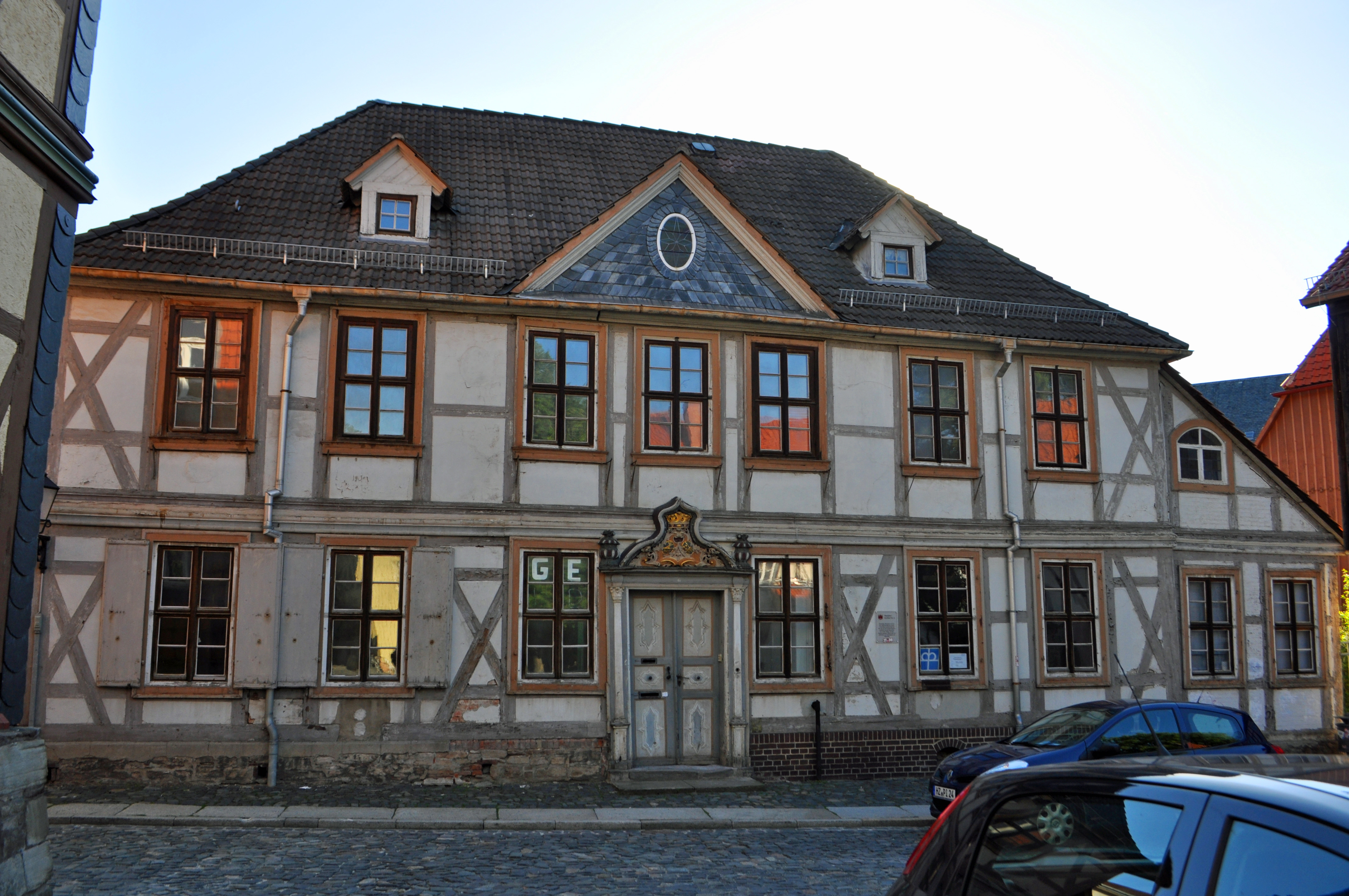 Ehemalige Oberpfarre am Oberpfarrkirchhof 6 in Wernigerode, erbaut um 1718.